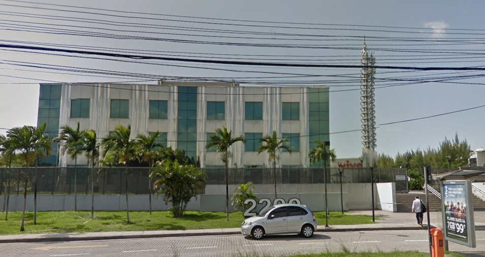 Sede da empresa Vivo no Rio de Janeiro.